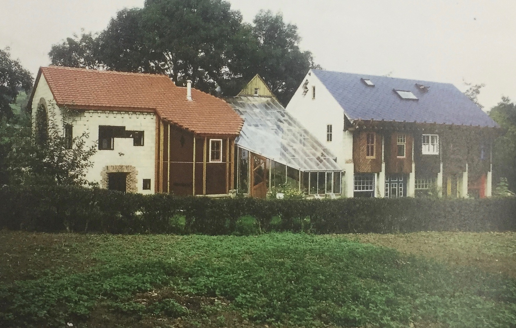 Habitation personnelle de Bernard Herbecq à Jehay